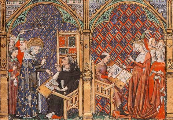 Links: König Ludwig IX. (Saint Louis) besucht Vinzenz von Beauvais bei dessen Arbeit an dem Werk Speculum historiale. Rechts: Jean de Vignay wird von der Königin Johanna (Ehefrau von Philipp VI.) besucht, für die er eine Übersetzung des Werks in das Französische anfertigt. (Paris, Bibliothèque natinale de France)